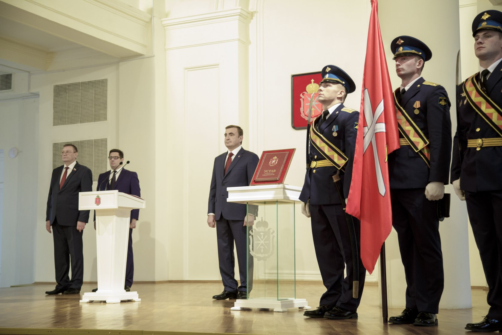 Инаугурация Губернатора Тульской Области А.Г. Дюмина